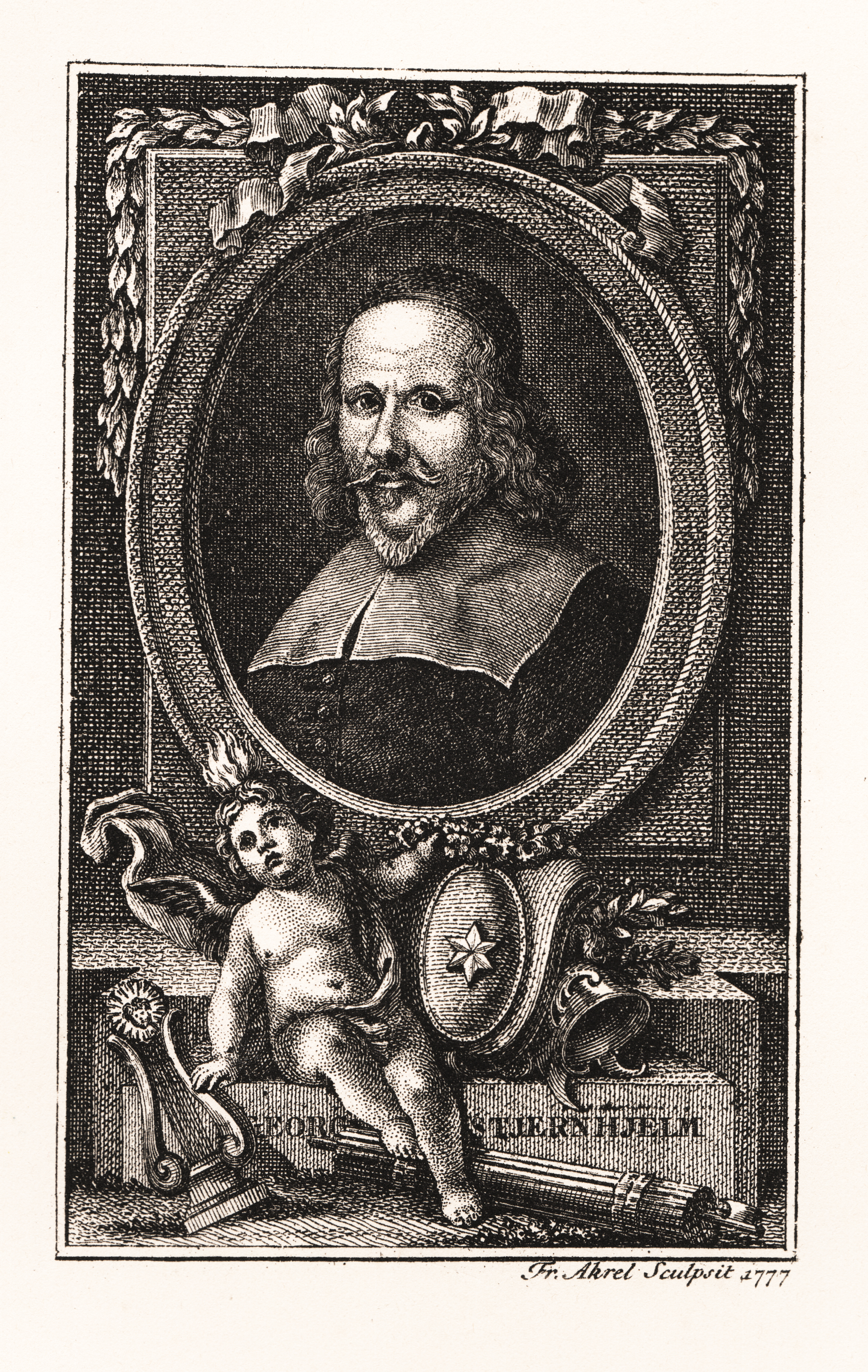 Georg Stiernhielm (1598-1672). Kopparstick utfördt af F. Acrel, så sent som 1777. Samma typ finnes i mycket litet format, sannolikt af Glassbach, samt i aquatintamanér af I. B. Berndes, efter J. v. Bredas kopia af porträttet i Vitterhets-, Hist.- och Antikv.-Akademien; i Sv. Biogr. Lexikon uppgifves det åtföljt Hammarskölds upplaga af Stiernhielms Vitterhetsarbeten, men återfinnes dock ej i K. Bibliotekets exemplar.